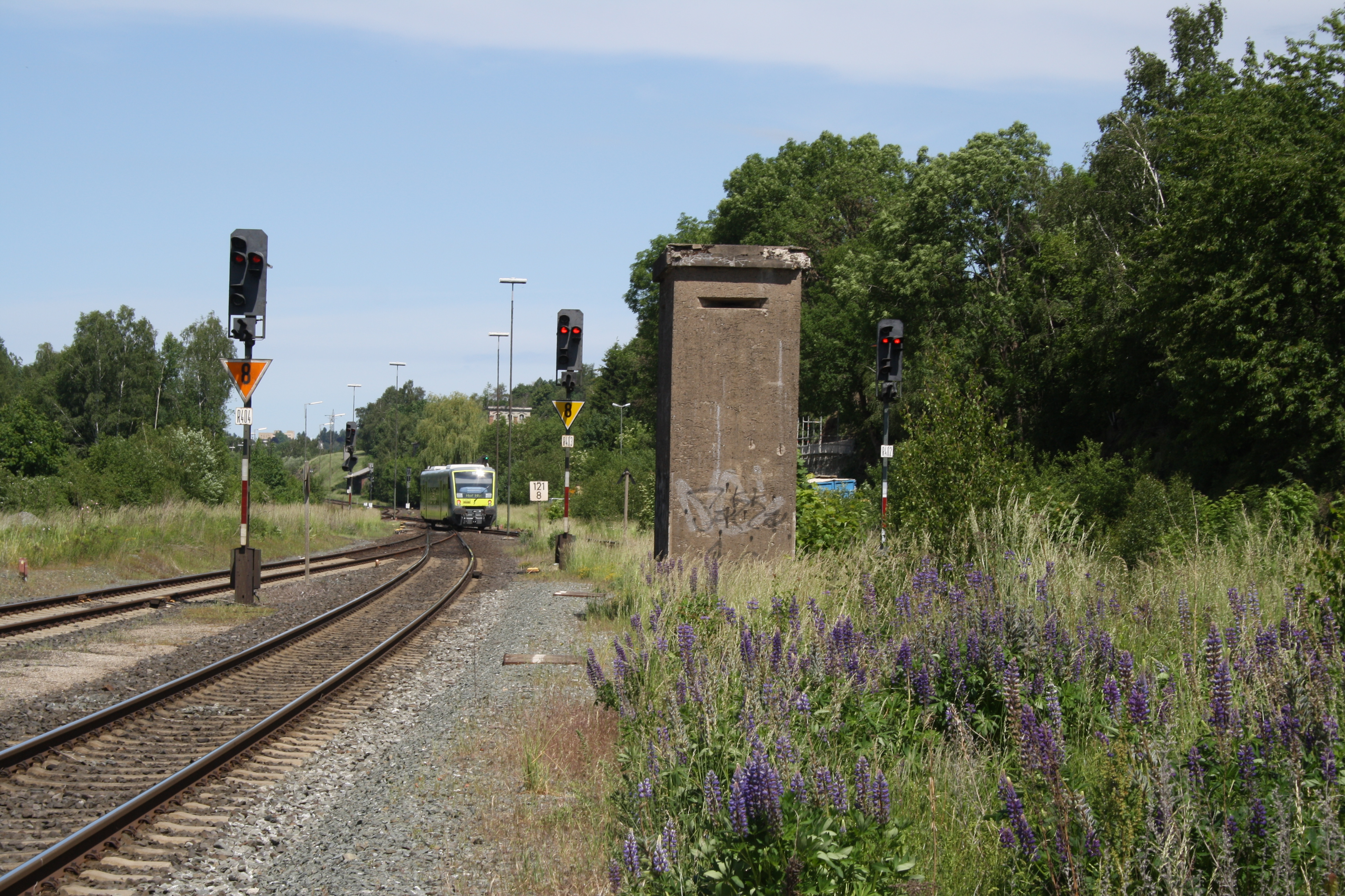 Splitterbunker im Bahnhof Oberkotzau